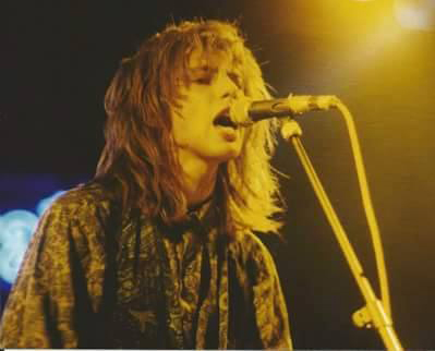 Der Singer/Songwriter Reverend Schulzz live, 1993